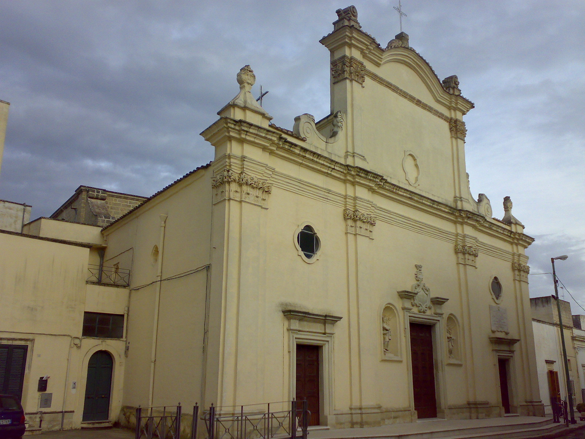 Chiesa Madre di Arnesano, provincia di Lecce